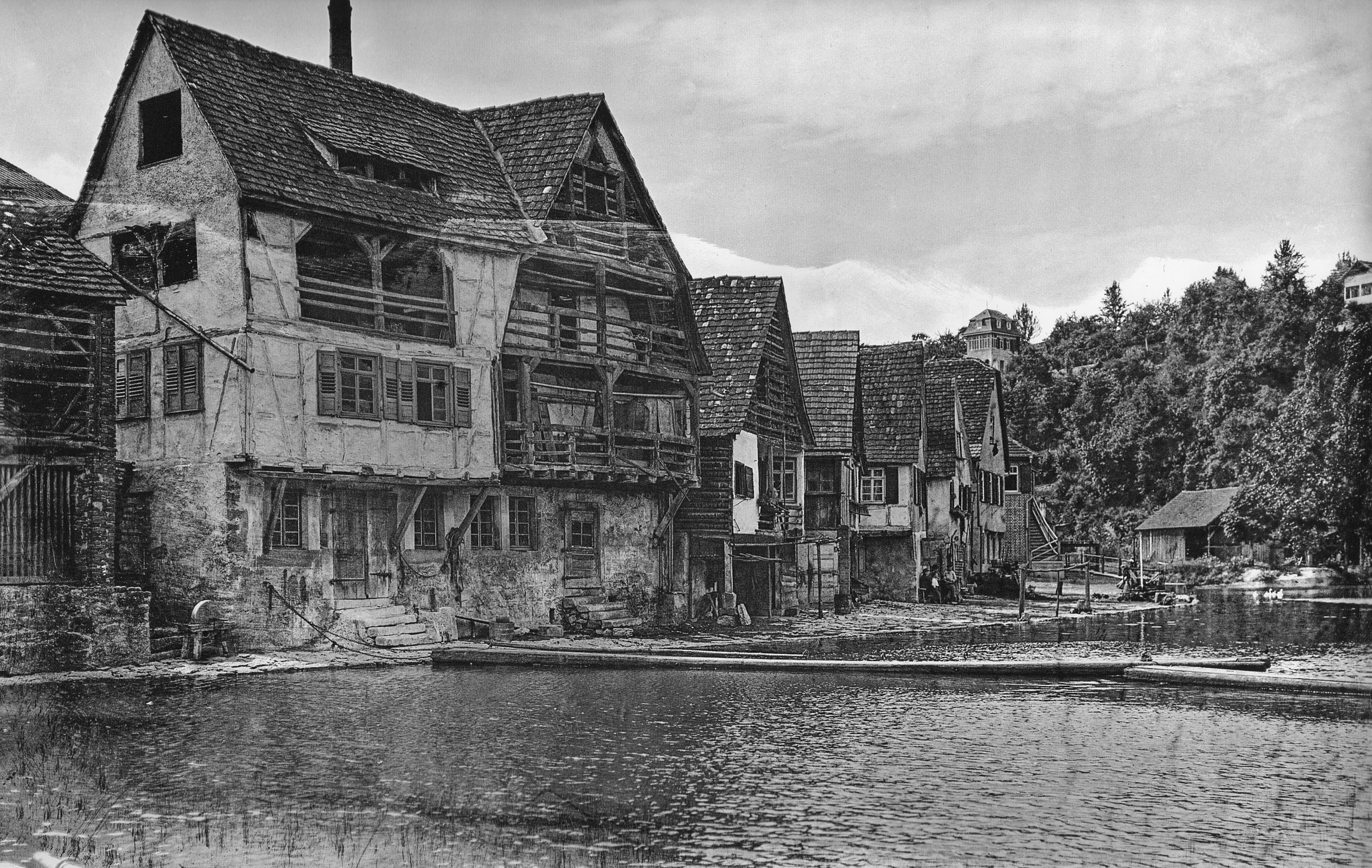 Backnang, Alte Gerberhäuser an der Murr, um 1910